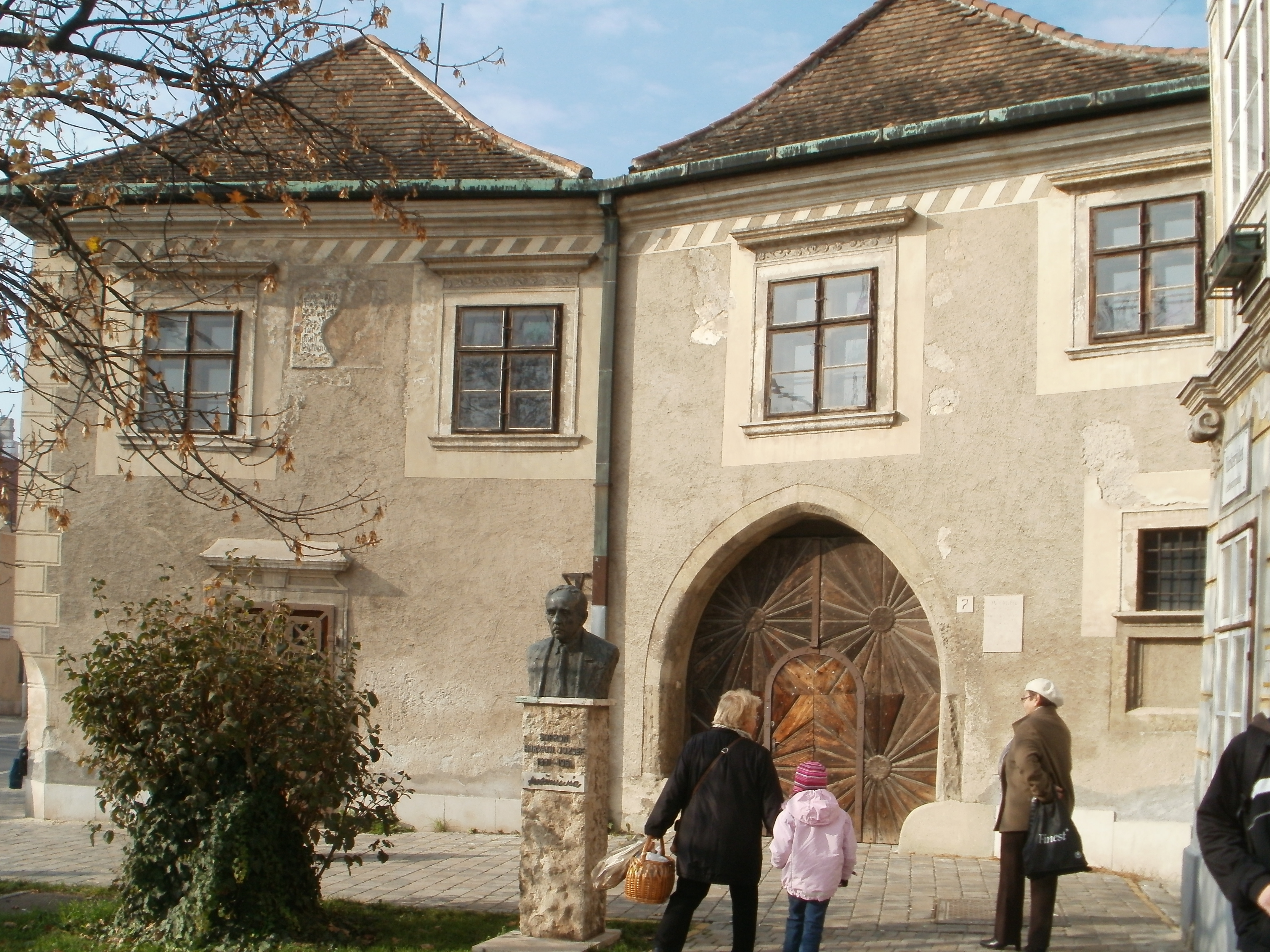 A Rejpál-ház Sopronban, a Várkerület 7 szám alatt áll. A Festő-köz sarkán látható egyemeletes lakóház középkori elődjét római épületmaradványokon emelték. A 16. század második felének reneszánsz stílusában formálódott ki mai alakja, noha jelentős középkori részleteket - például a gótikus lépcsőházat – is megőrzött. Udvari szárnyait a 16.-17. században bővítették. Egykor iparosok (kovácsok, hentesek, cukrászok) tulajdona volt. A ház előtt Soproni Horváth József festőművész szobra áll. (Részletek Dr. Czellár Katalin Sopron című könyvéből) This is a photo of a monument in Hungary, Identifier: 5033